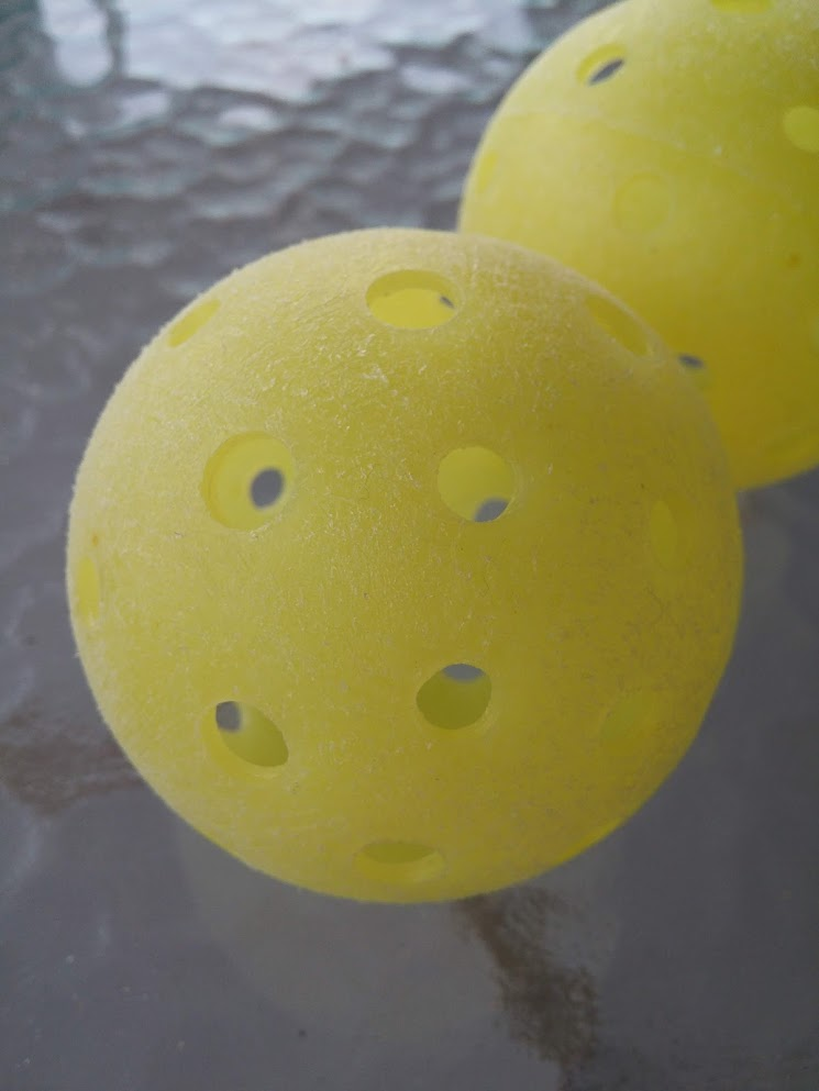 Die Bälle werden in einem rotierenden Spritzgußverfahren randlos hergestellt. Die Löcher werden nachträglich in den abgekühlten Ball eingebohrt.